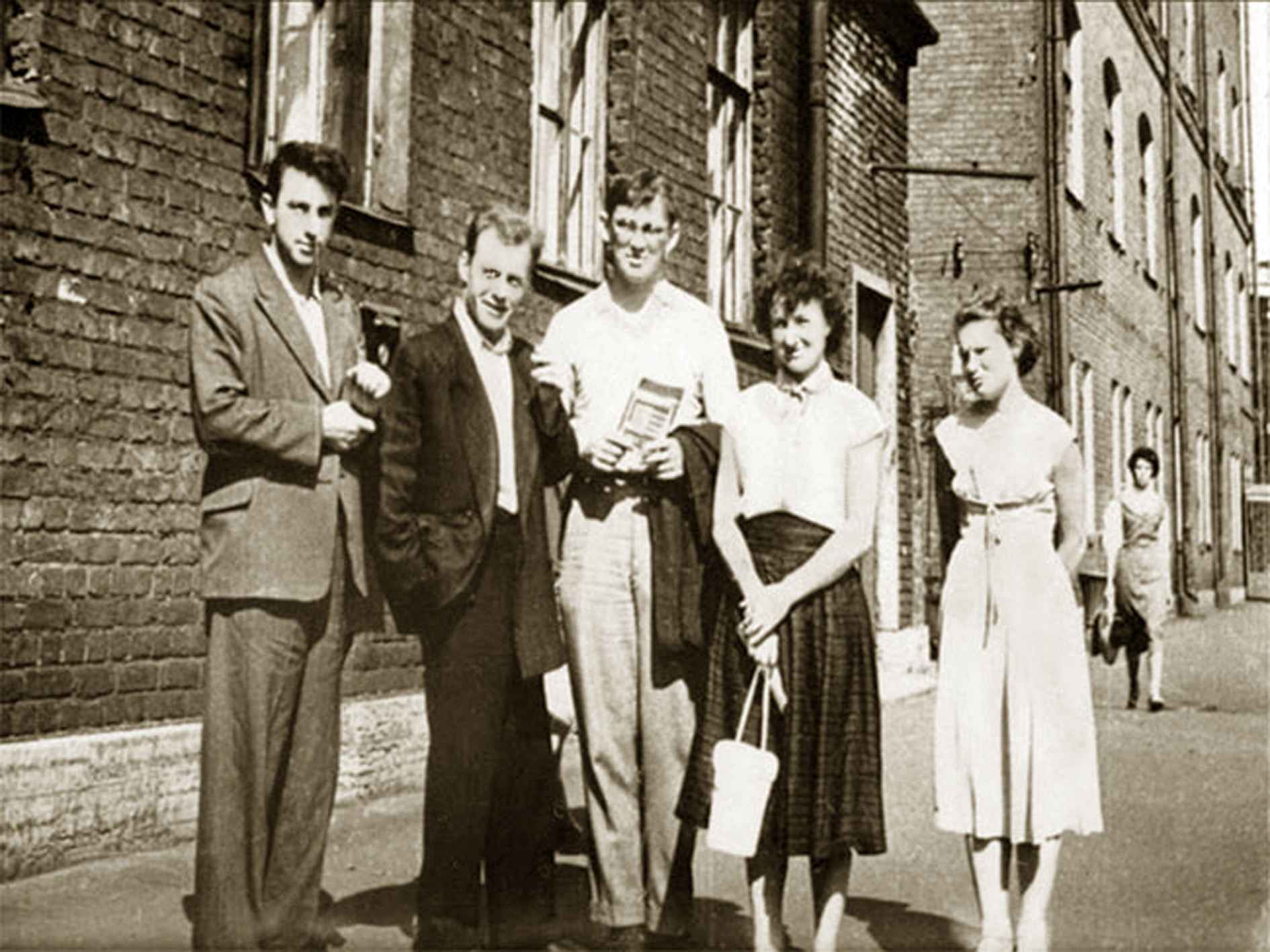 И. М. Воронцов (слева) в год выпуска.